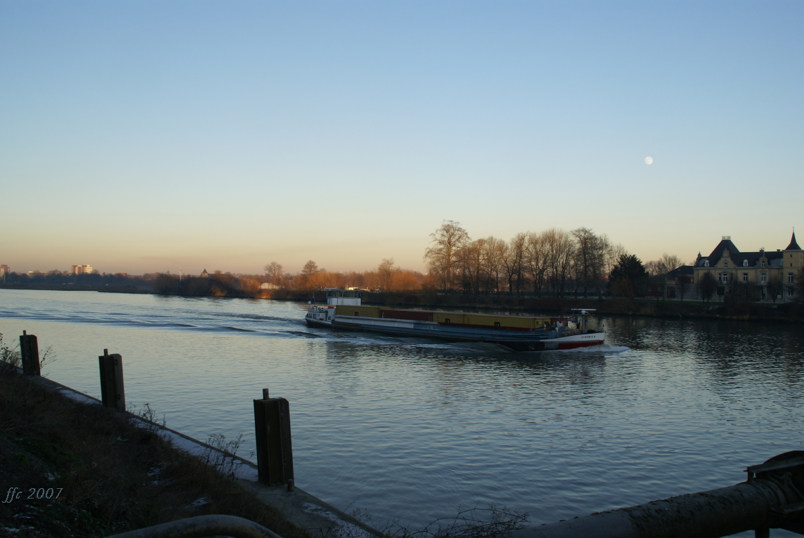 Canal de Lanaye - Kanaal van Ternaaien in Nederland